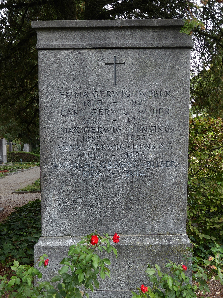 Andreas Gerwig (1928–2014) Dr.jur., Rechtsanwalt, Politiker. Grab auf dem Friedhof Wolfgottesacker, Basel